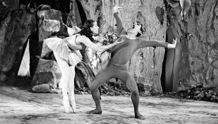 Baletti "Pessi ja Illusia" 1954. Tanssista - Doris Laine (Illusia), Heikki Värtsi (Pessi) ja Maj-Lis Rajala (Ristilukki)